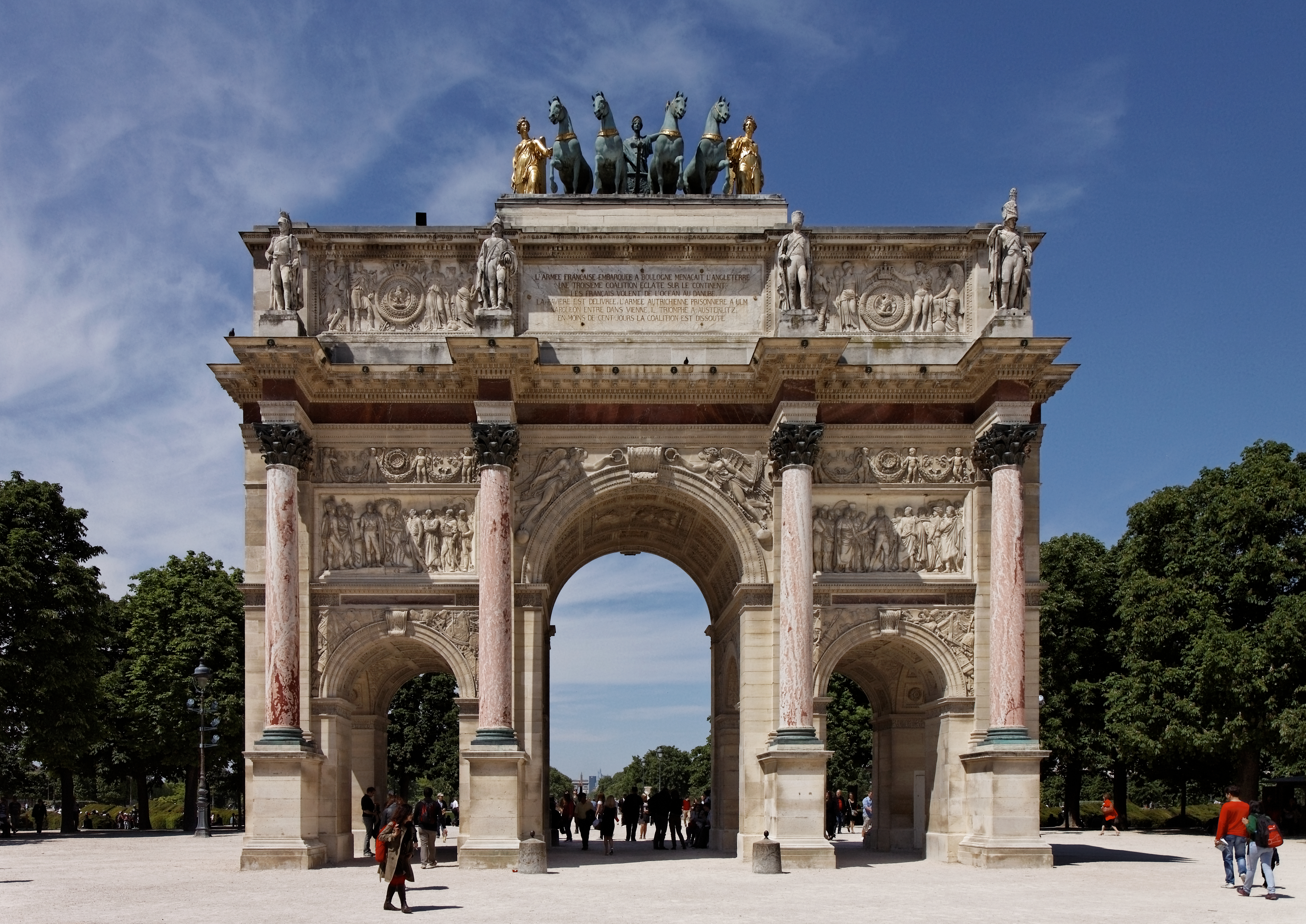 L'arc de triomphe du Carrousel dans le jardin des Tuileries.